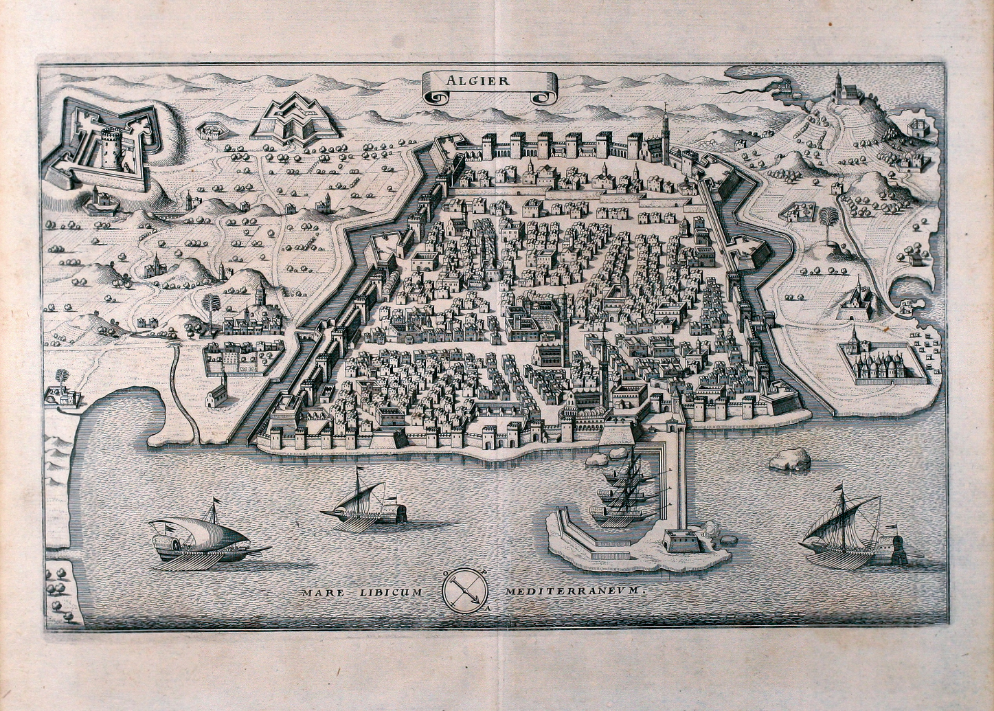 Antique town view of Algiers. Printed in Frankfurt by M. Merian in 1646. Attractive birdeye view of Algiers in Algeria from Matthäus Merian. Showing the city with city walls, outlying forts and several ships in the harbour. From J. Gottfried's "Neuwe Archontologia Cosmica".